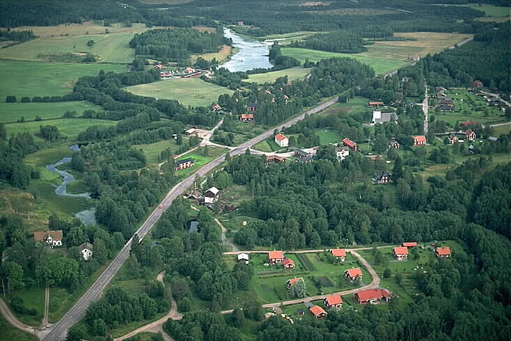 Motiv: Brattfors Nyckelord: Flygbilder, Riksintressen Kategori: Bruksmiljö Motiv: Brattfors. Riksväg 63 går förbi.